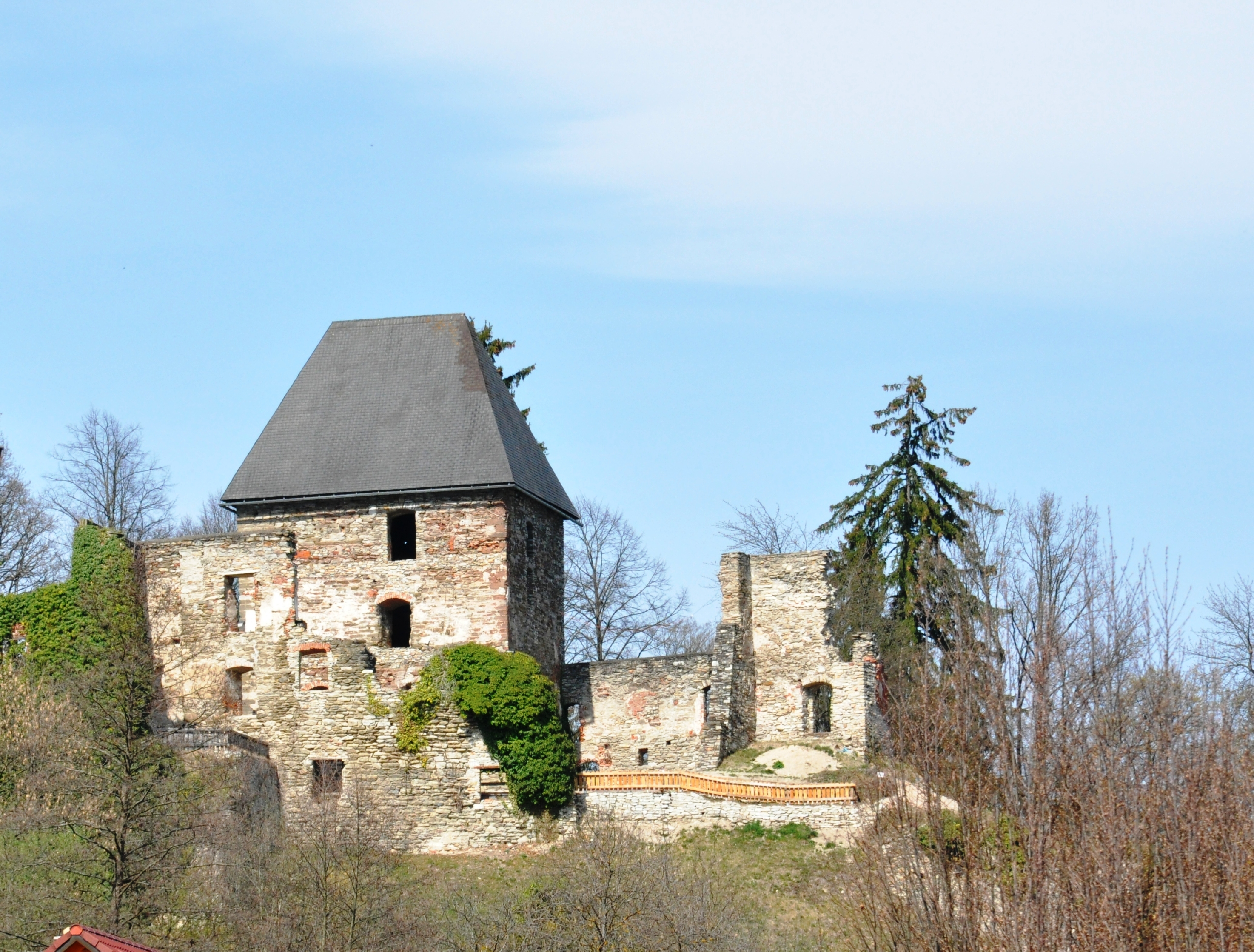 Burgruine Ligist (Altes Schloss, Veste Lubgast)